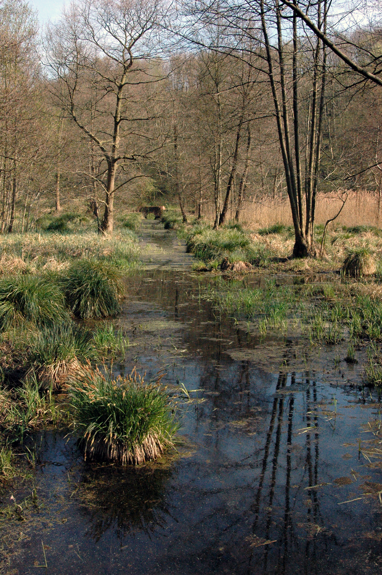 Originalbeschreibung: Flöthbach im Hülser Bruch in Krefeld – Anmerkung: Das kann der Flöthbach sein (dann aber nicht im NSG Hülser Bruch, evtl. LSG Hülser Berg/Hülser Bruch oder NSG Flöthbach?) oder das ist einer der Nebengewässer-Gräben im Hülser Bruch (dann andere Gewässerbezeichnung).